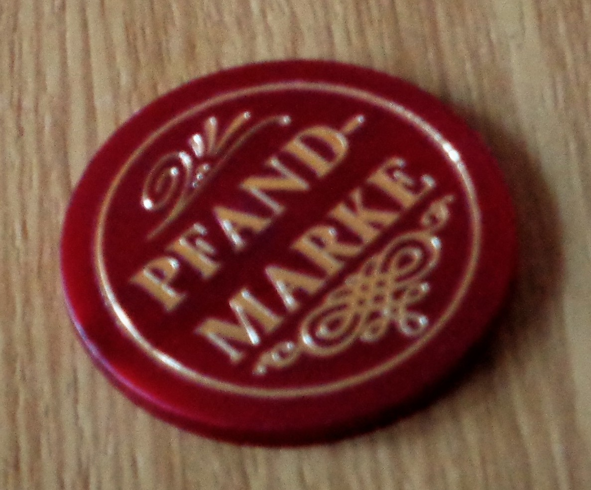 Pfandmarke zum Einlösen auf dem Kieler Weihnachtsmarkt.